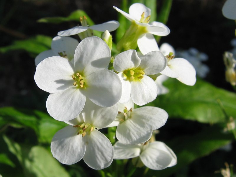 Steintäschel Aethionema ssp.